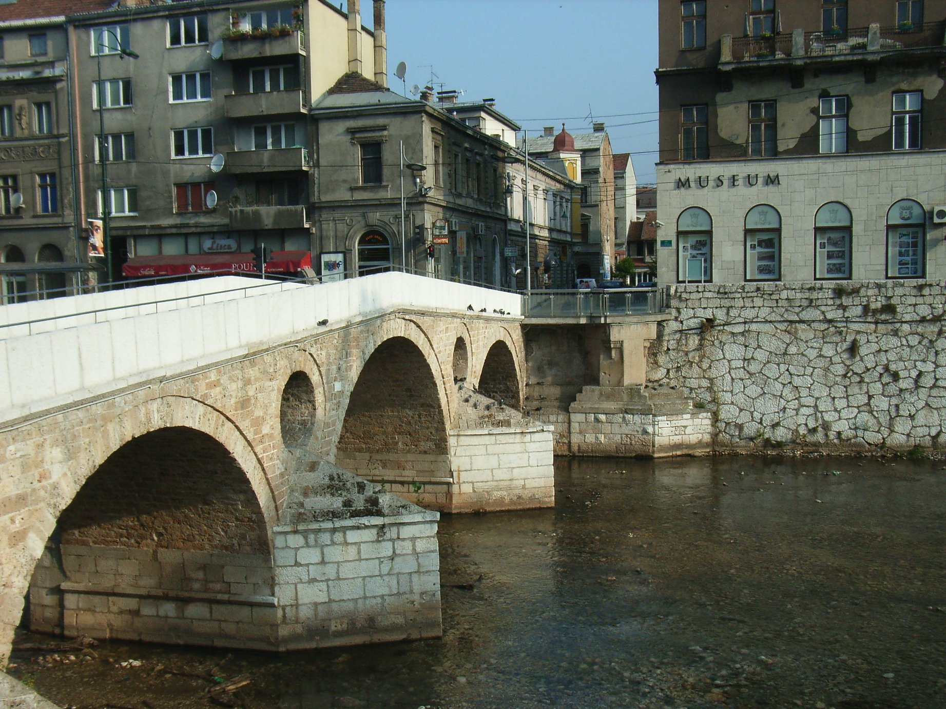 Die Lateinerbrücke in Sarajevo (2007).